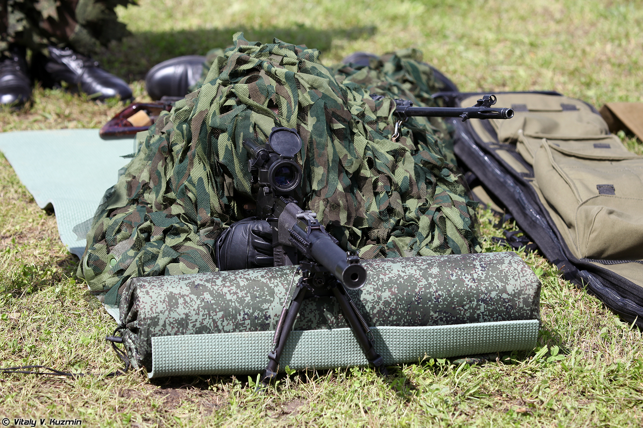 Винтовка снайперская специальная модернизированная ВССМ Винторез 6П29М (Modernized sniper rifle VSSM Vintorez 6P29M)